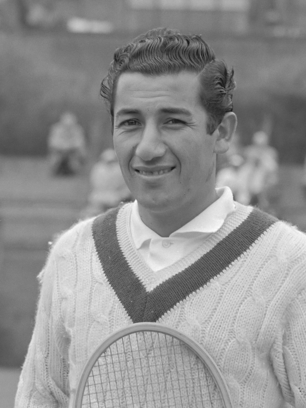 Davidscupwedstrijd Nederland tegen Chili. Ayala (Chili) 11 mei 1956